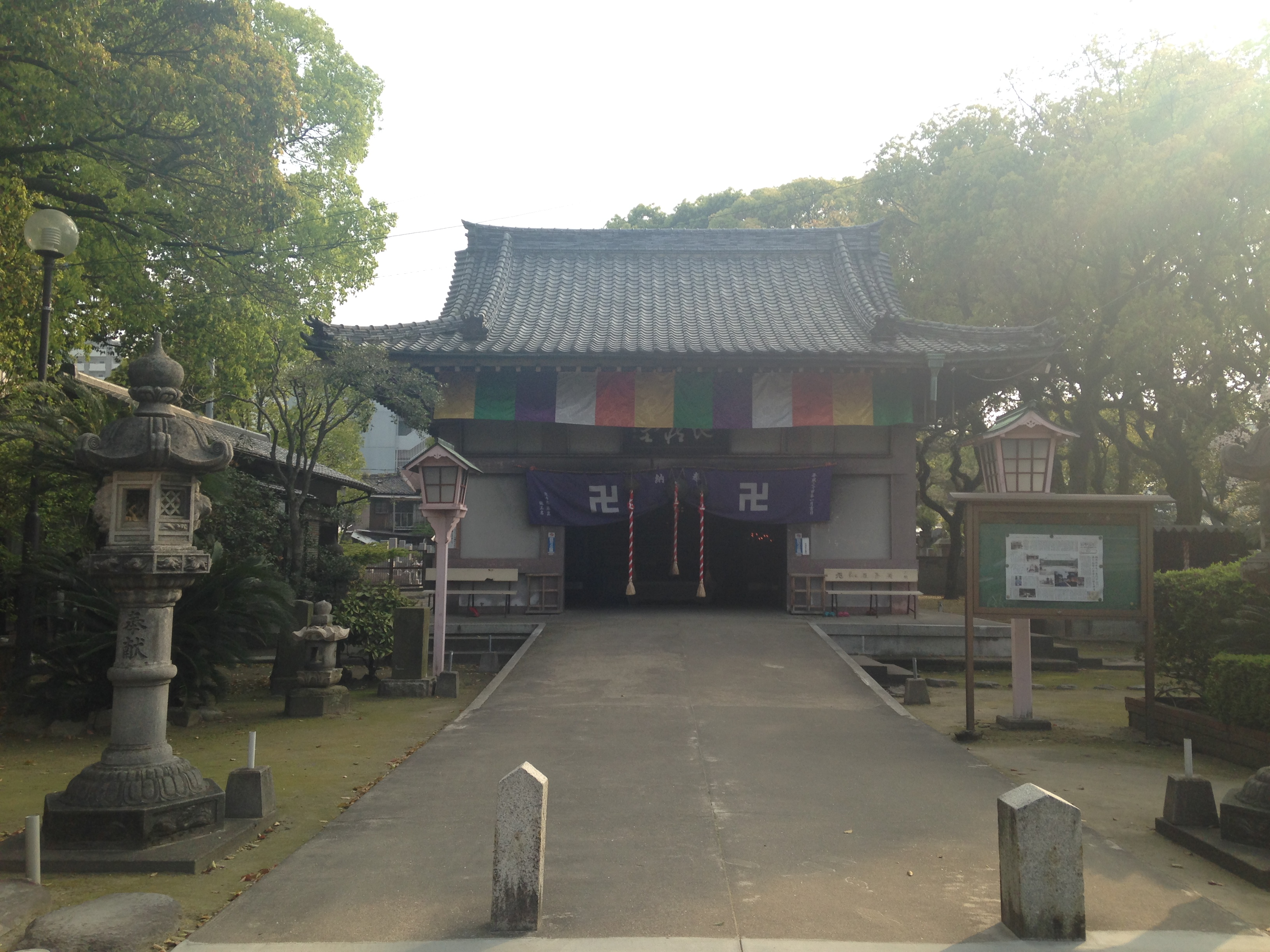 崇福寺・旭地蔵堂